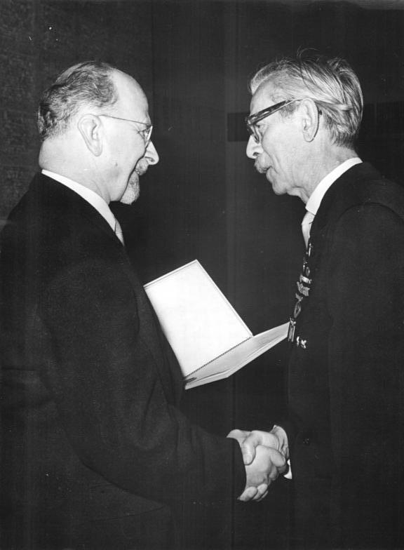 Vaterländischer Verdienstorden an Otto Nagel Zentralbild 5.10.1964 Hohe staatliche Auszeichnung verliehen An hervorragnede Persönlichkeiten und Kollektive wurden aus Anlass des 15. Jahrestages der Gründung der DDR am 5.10.1964 auf einem Festakt im neuen Amtssitz des Staatsrates hohe staatliche Auszeichnungen verliehen. UBz: Der Vorsitzende des Staatsrates, Walter Ulbricht (links), zeichnet den Vizepräsidenten der Akademie der Künste, Prof. Otto Nagel, mit dem Vaterländischen Verdienstorden in Gold aus. (Junge) Abgebildete Personen: Nagel, Otto Prof.: Maler, Präsident der Akademie der Künste (AdK), Nationalpreisträger, Vaterländischer Verdienstorden (VVO) in Gold, DDR (GND 118586300) Ulbricht, Walter: Staatsratsvorsitzender, Erster Sekretär des Zentralkomitees (ZK) der SED, Vorsitzender des Nationalen Verteidigungsrates, DDR